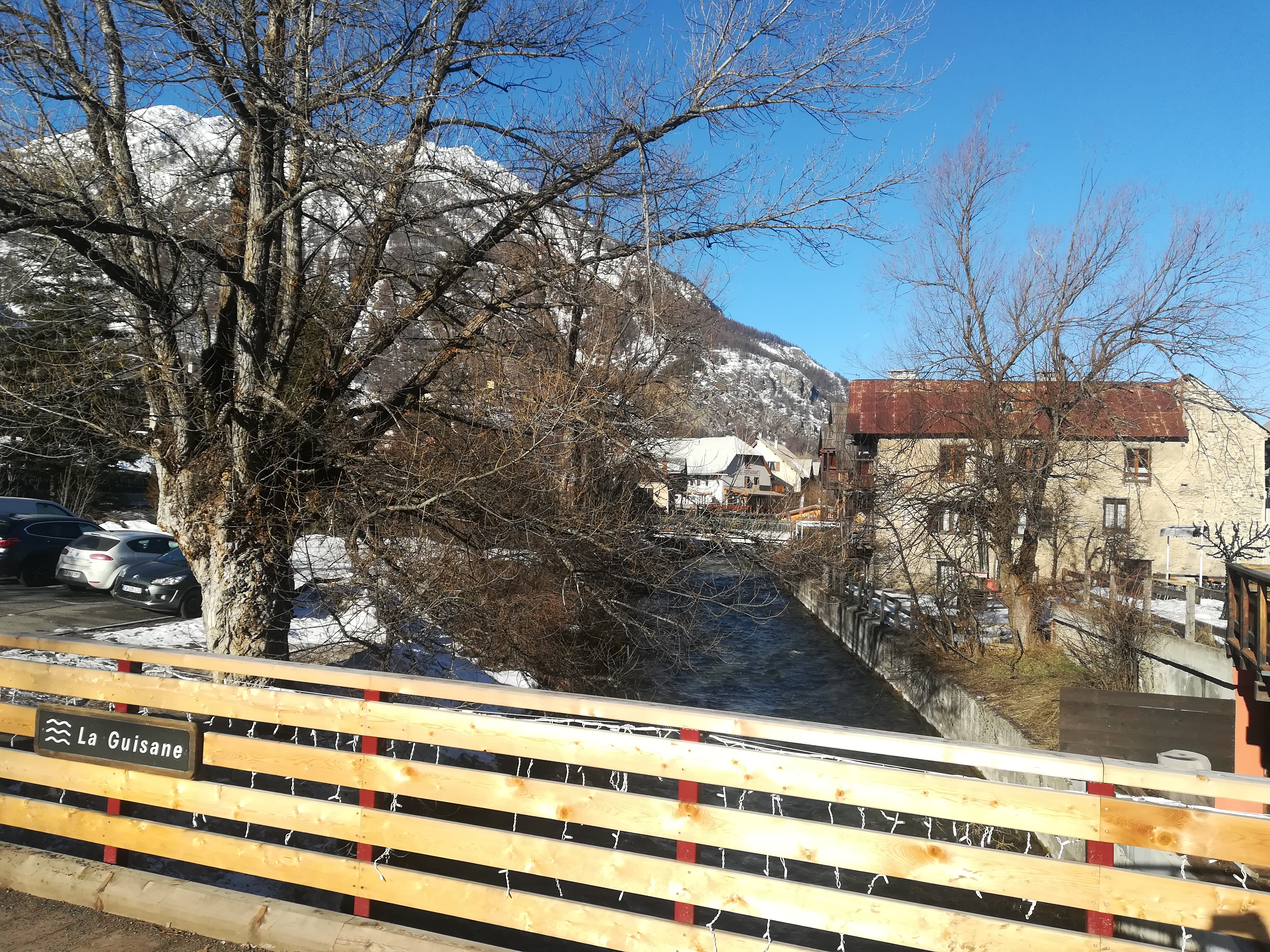 Vue, depuis un pont, du cours de la Guisane et de ses rives dans la commune de La Salle-les-Alpes